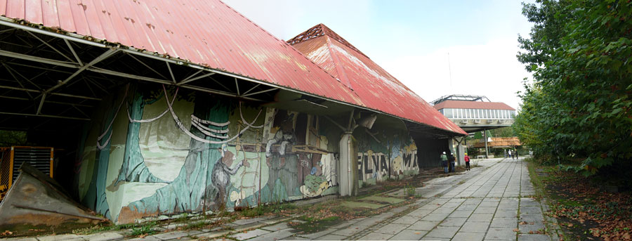 Avenida Principal Parque de Atracciones de Vizcaya